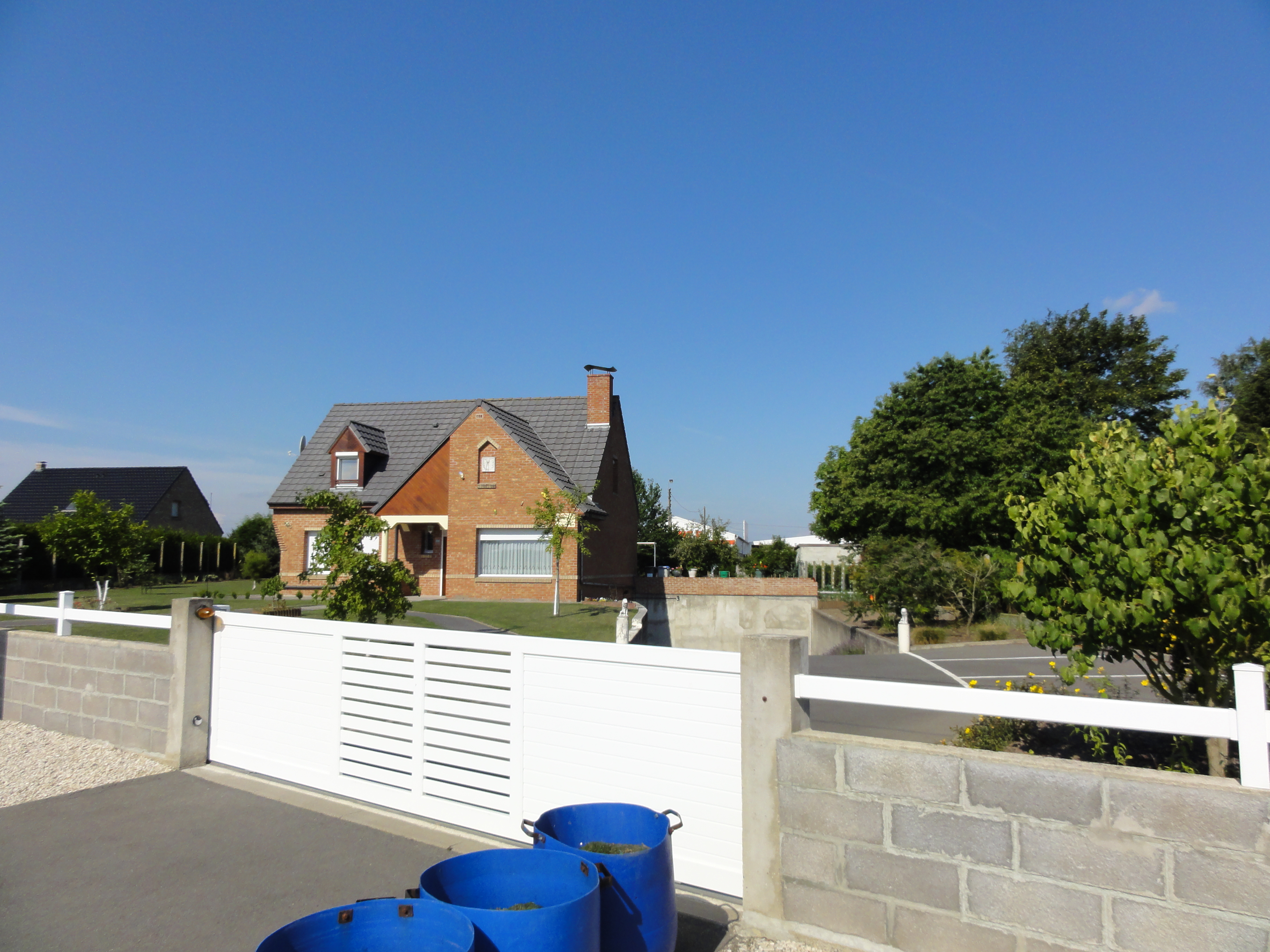 Terril n° 127 dit Traisnel Est, disparu, Fosse Traisnel de la Compagnie des mines d'Aniche, Aniche, Nord, Nord-Pas-de-Calais, France.